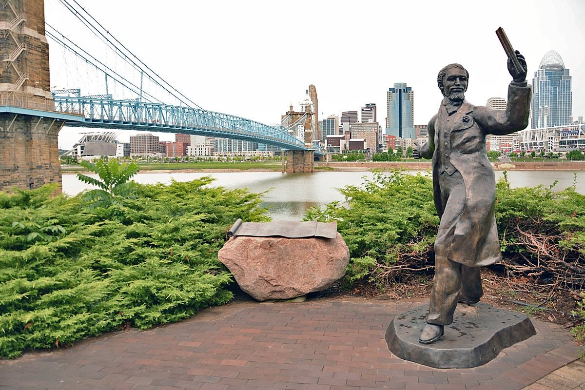 John August Roebling Denkmal in Covington/Cincinnati